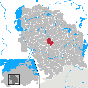 Grebbin in Mecklenburg-Vorpommern - District Parchim